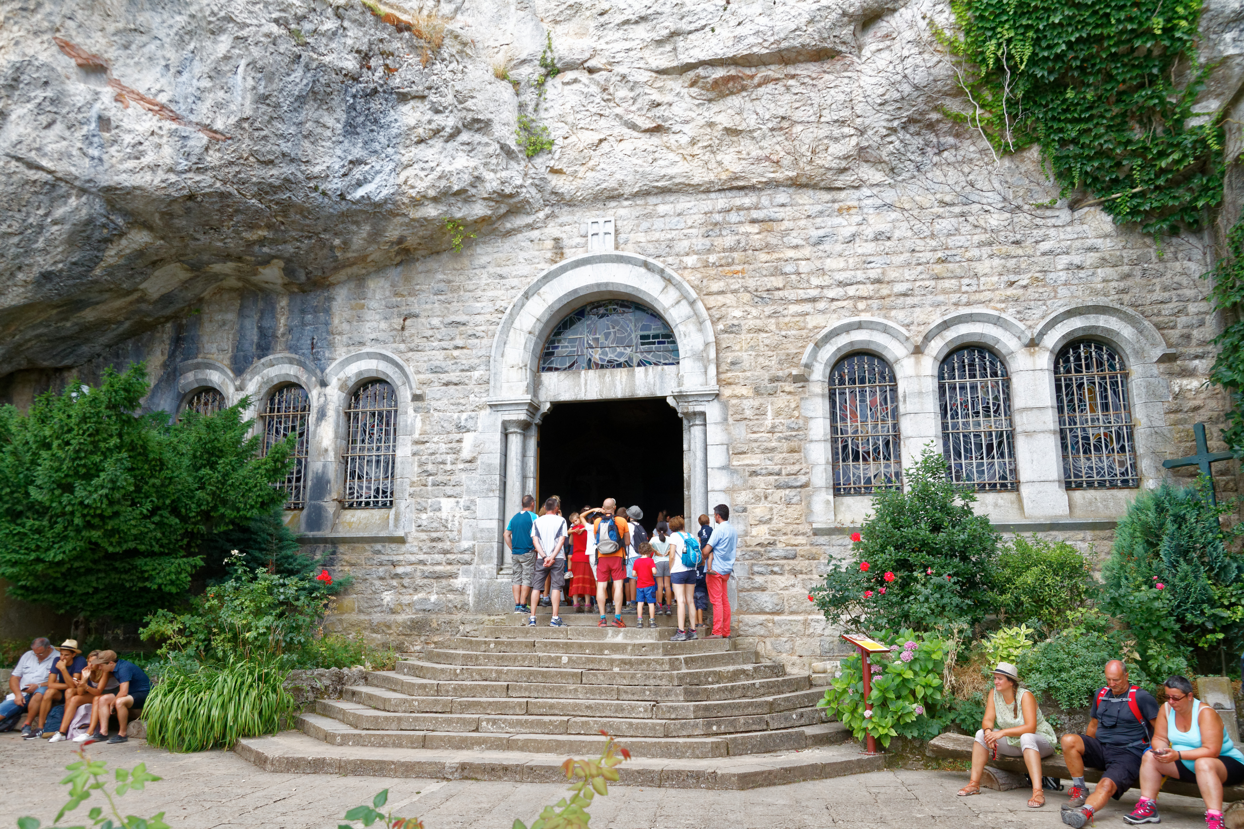 Eingang zum Grottenheiligtum der Maria Magdalena im Massif de la Sainte-Baume in der Provence